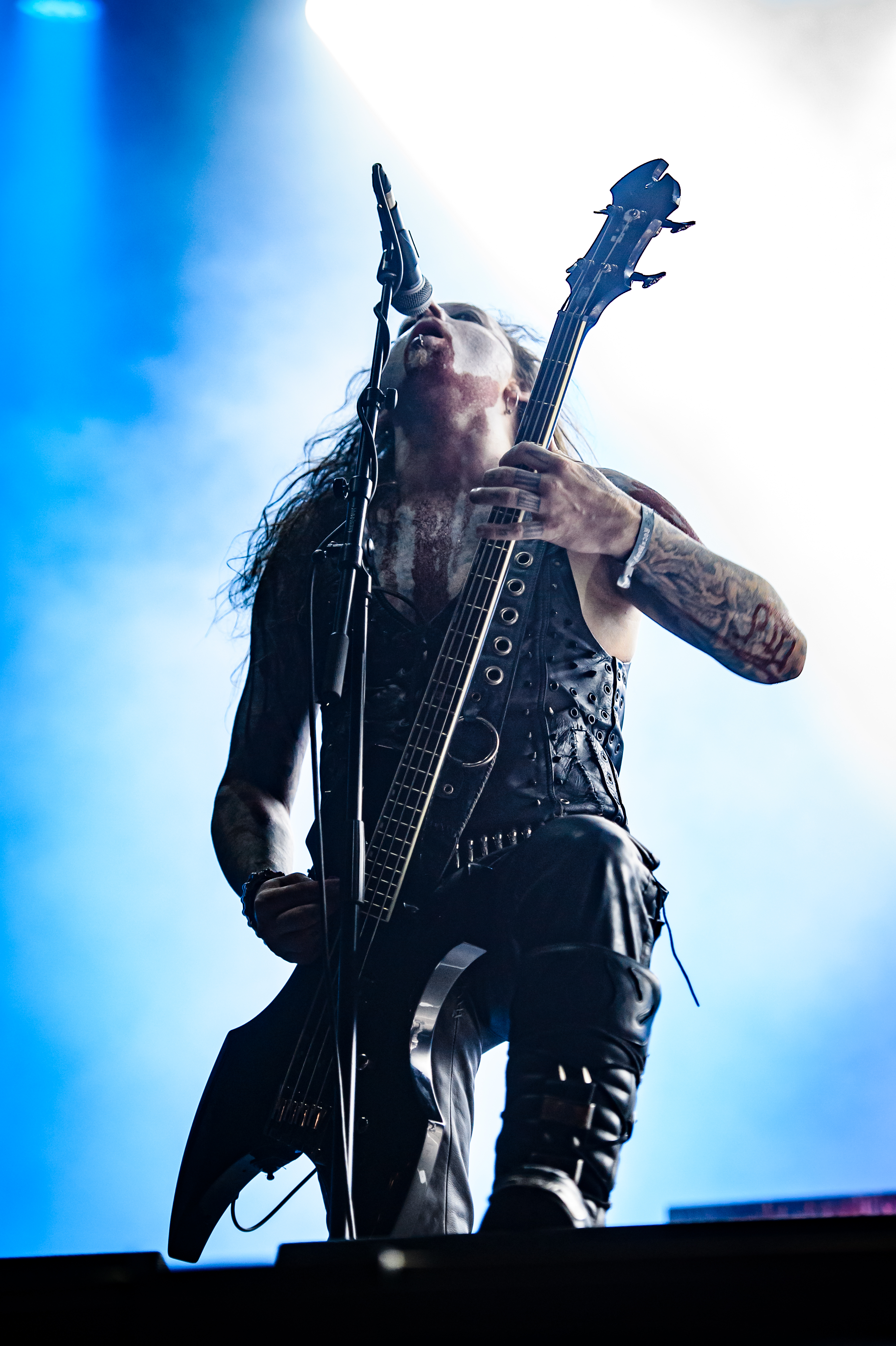 'RockHarz Open Air 2017; Ballenstedt': 'Belphegor'